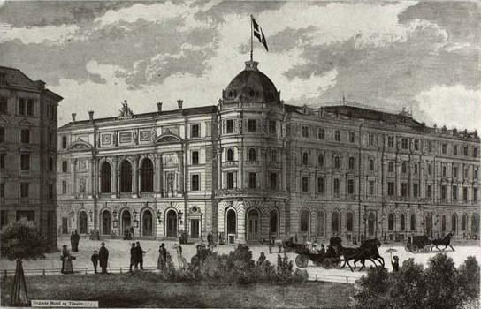 Dagmarteatret i 1882. Illustreret Tidende 30. april 1882